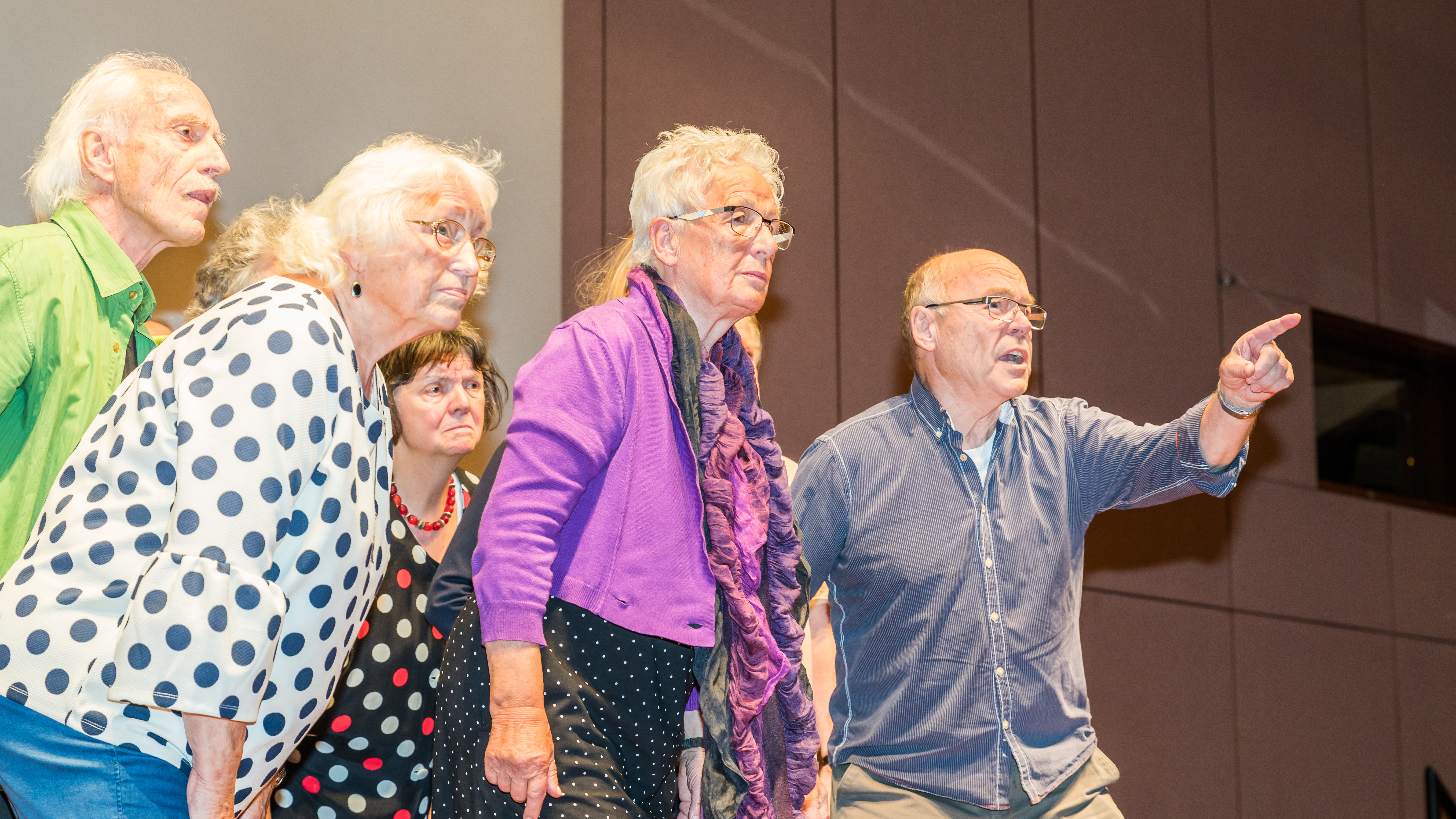 Eröffnung der Sonderausstellung „KÖLN 1968! Protest. Pop. Provokation“ des Kölnischen Stadtmuseums. Veranstaltungsort: Börsensaal der IHK Köln Foto: Szenischer Bogen zu 1968 mit dem Freien Werkstatt Theater - Altentheater